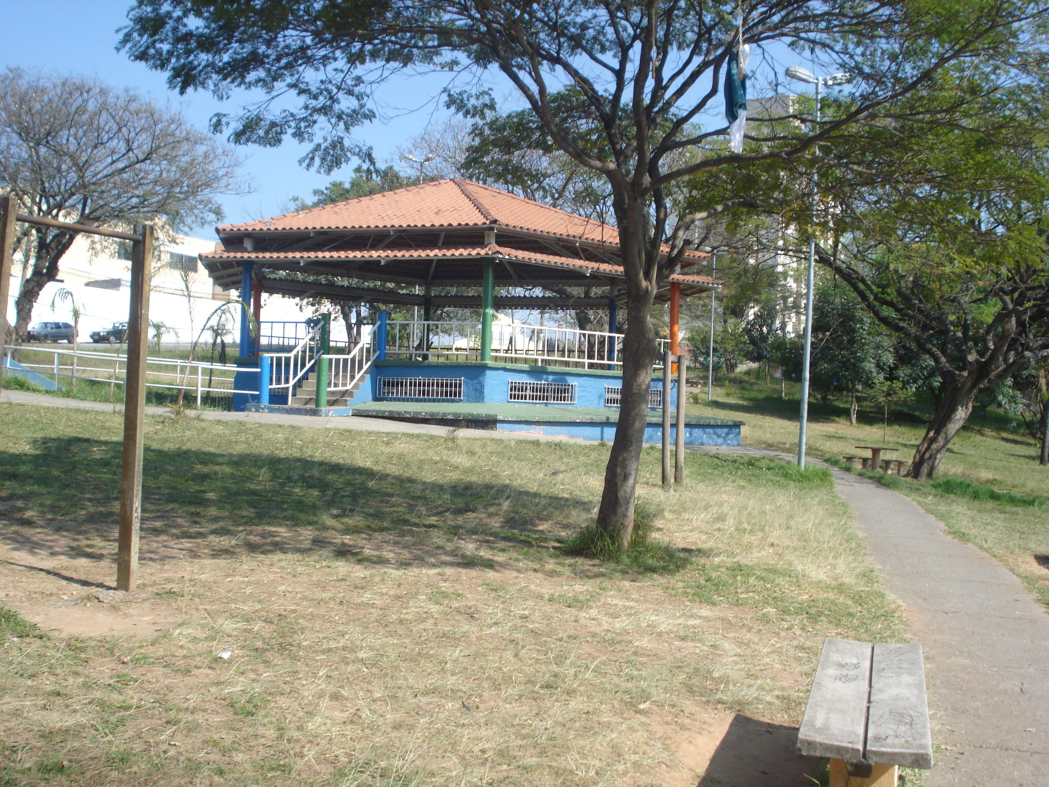 Praça do Coreto